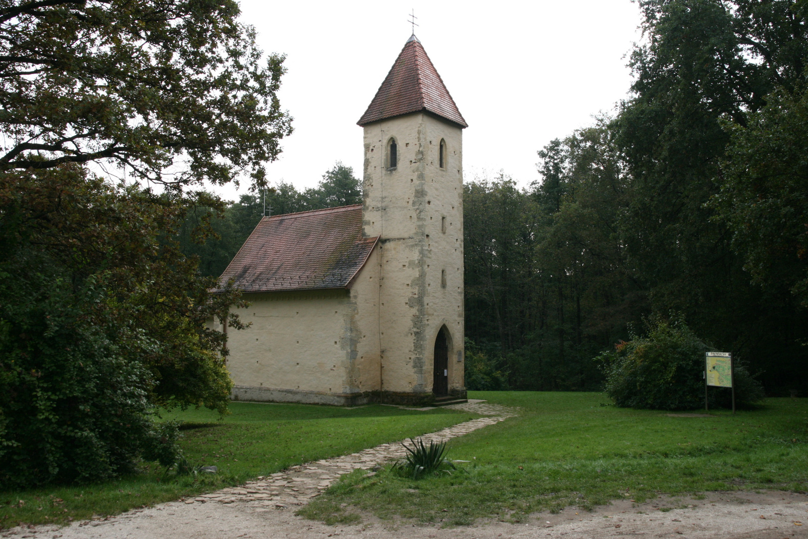 Szentháromság és Szent István király római katolikus templom (Velemér, Paprét)